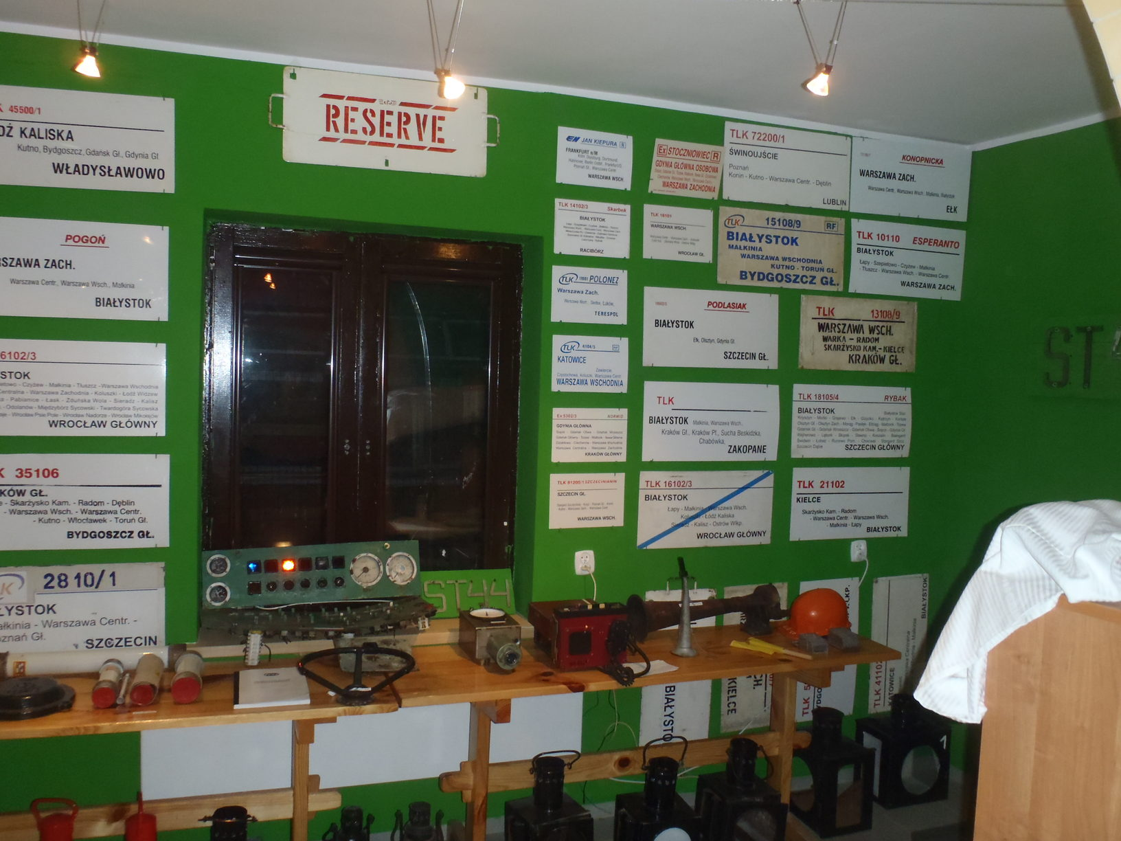 Ekspozycja Kolejowa SSK "Kolejowe Podlasie" w Białymstoku - kolekcja tablic kierunkowych z pociągów, fragment pulpitu z lokomotywy SU45, koło nastawnika z ST44